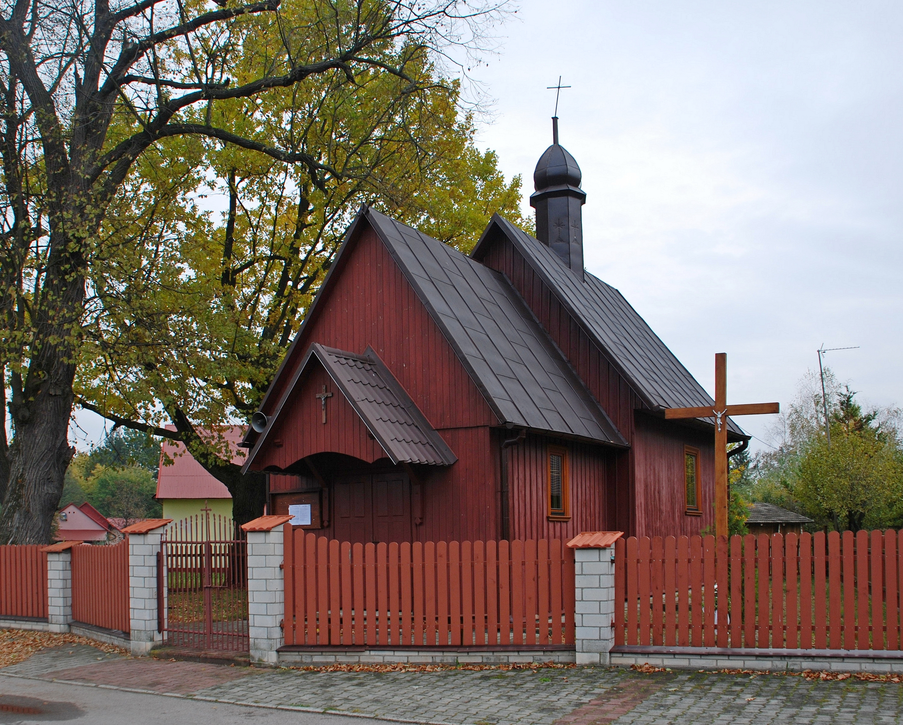 wieś Szyperki